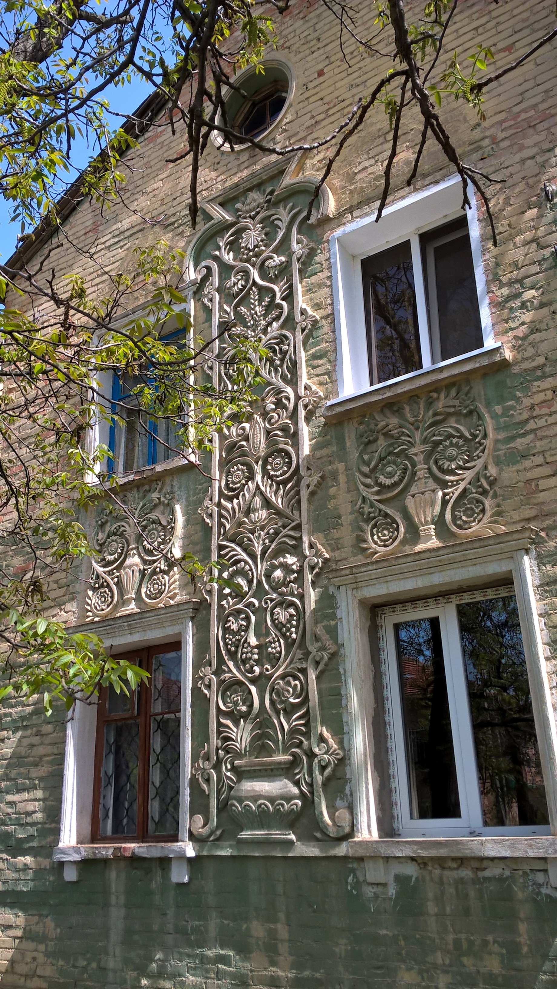 Кам'яні візерунки на старому будинку Нової Каховки